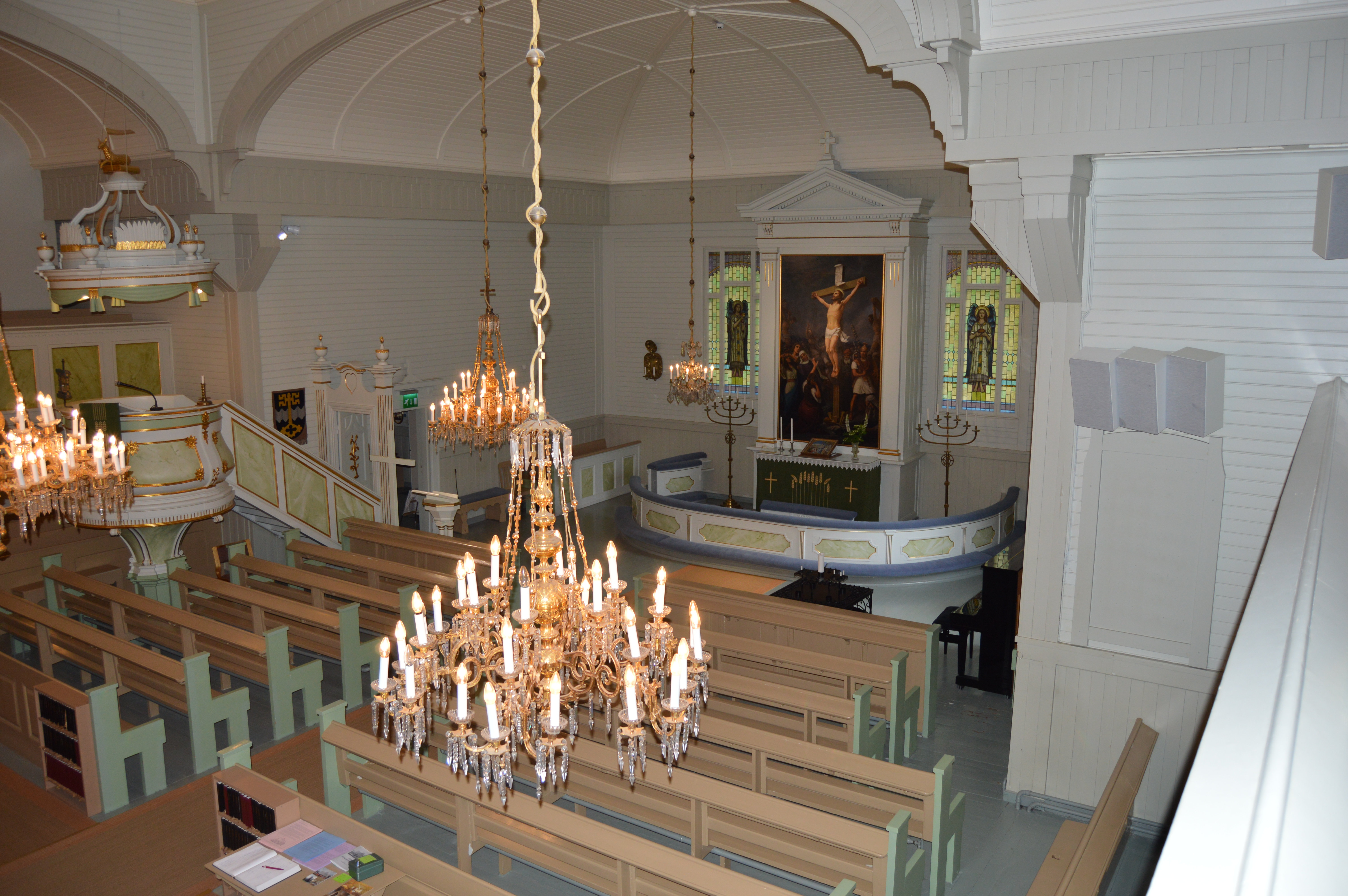 Iitin kirkko